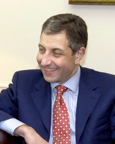 Zurab Noghaideli, Georgian Prime Minister